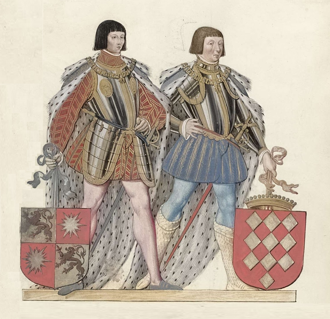 Jean de Luxemburg, seigneur de Ville, et Antoine I de Lalaing